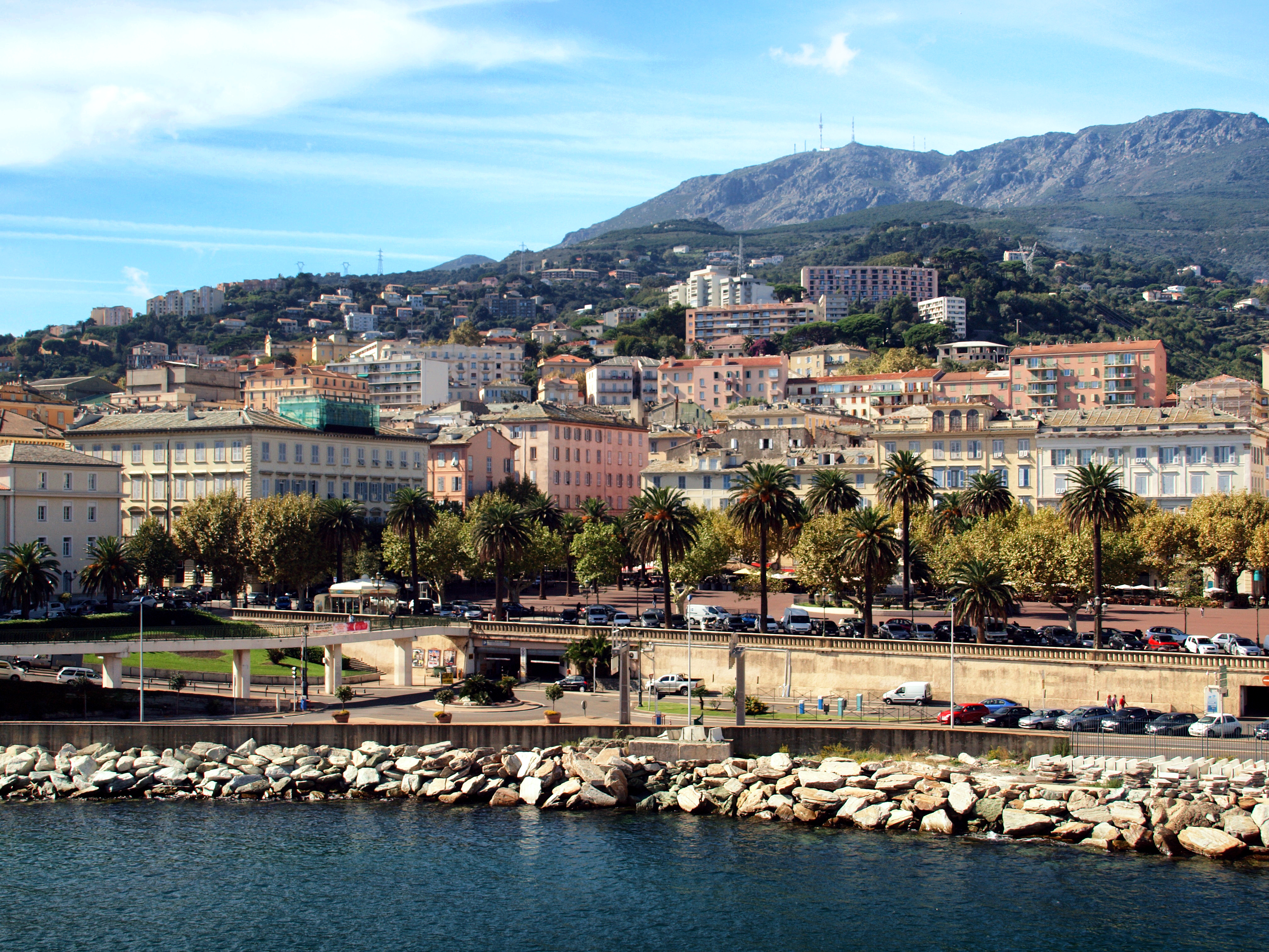 Bastia, Corse - La place Saint-Nicolas vue depuis la sortie du port